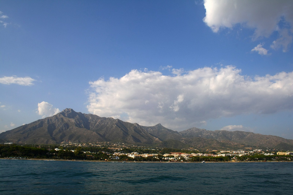 LA CONCHA